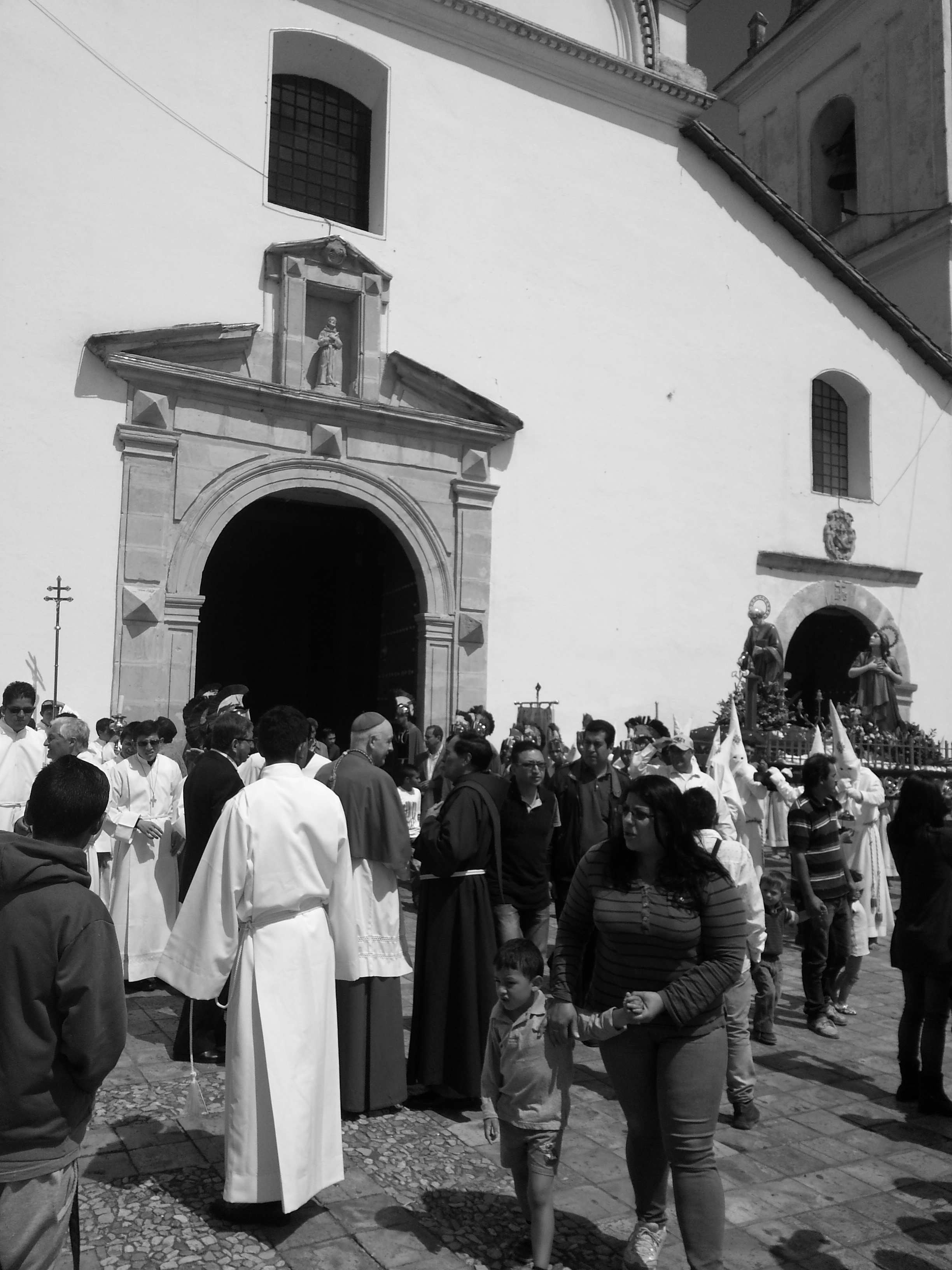 Guardia romana esperando el inicio de la procesión del Domingo de Resurrección en la iglesia de San Francisco de Tunja